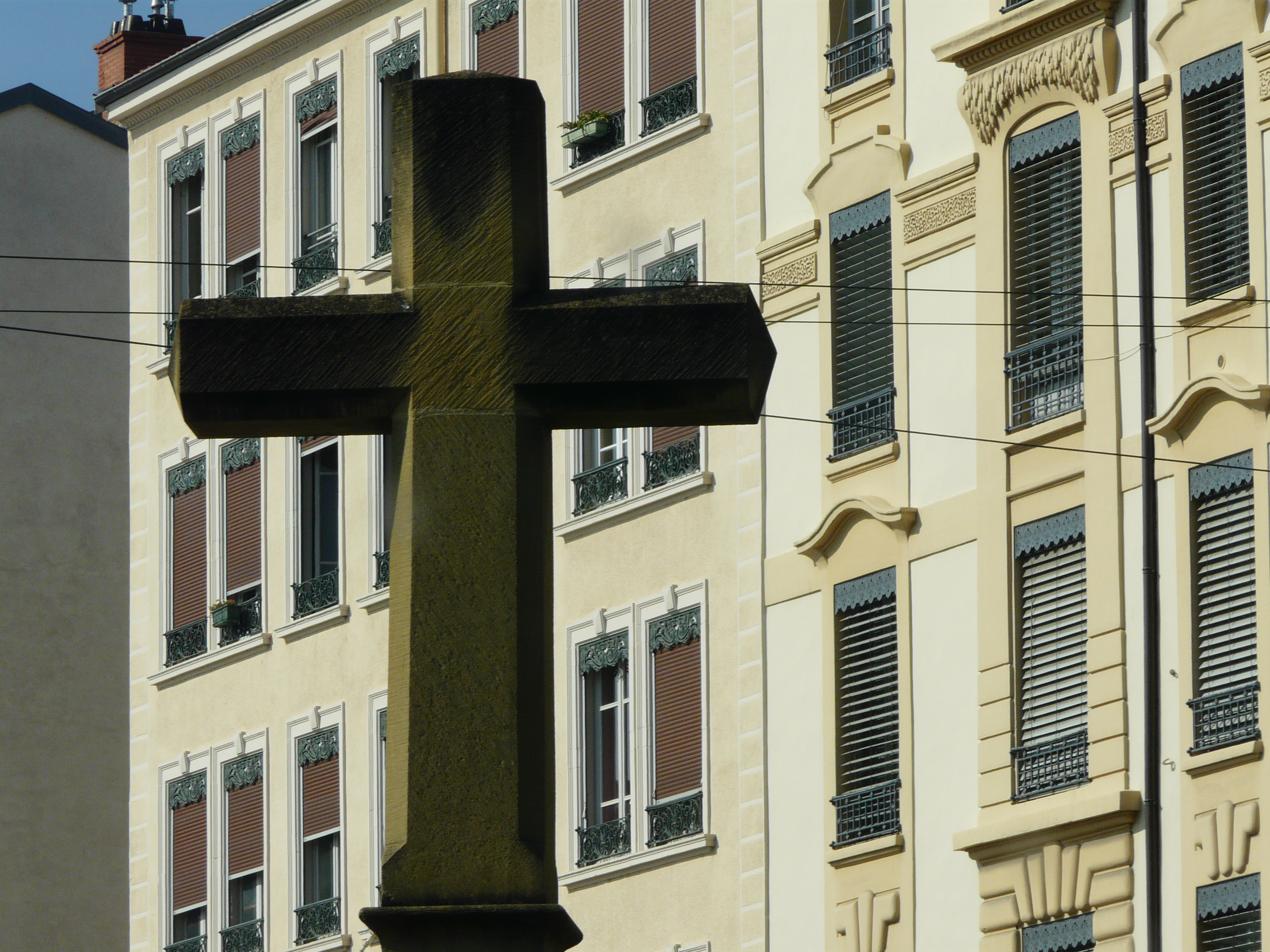 Croix en pierre de Couzon, du quartier de la Croix-Rousse (à Lyon).